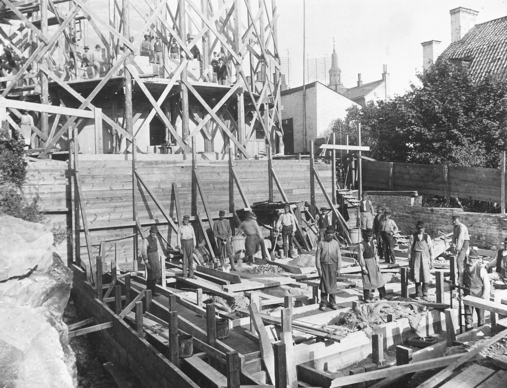 Mosebacke vattentorn under uppförande